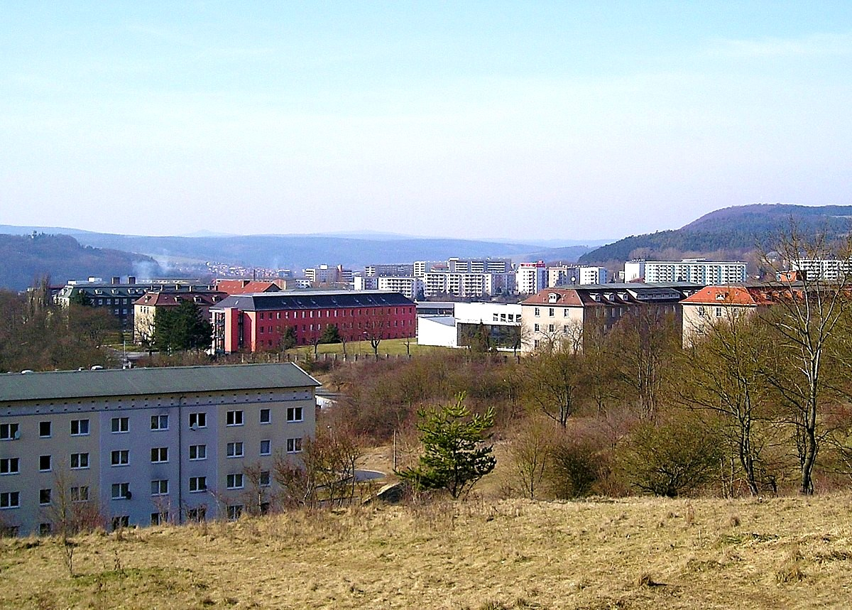 Drachenbergkaserne in Meiningen (Mitte)